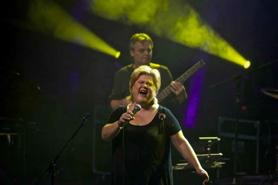 Lora Szafran Koncerty